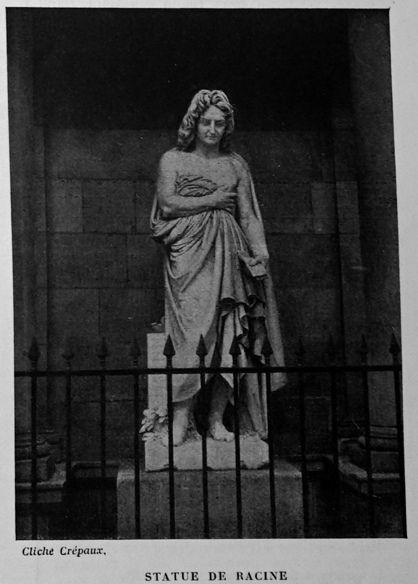 publié dans le "Revue régionale illustrée".